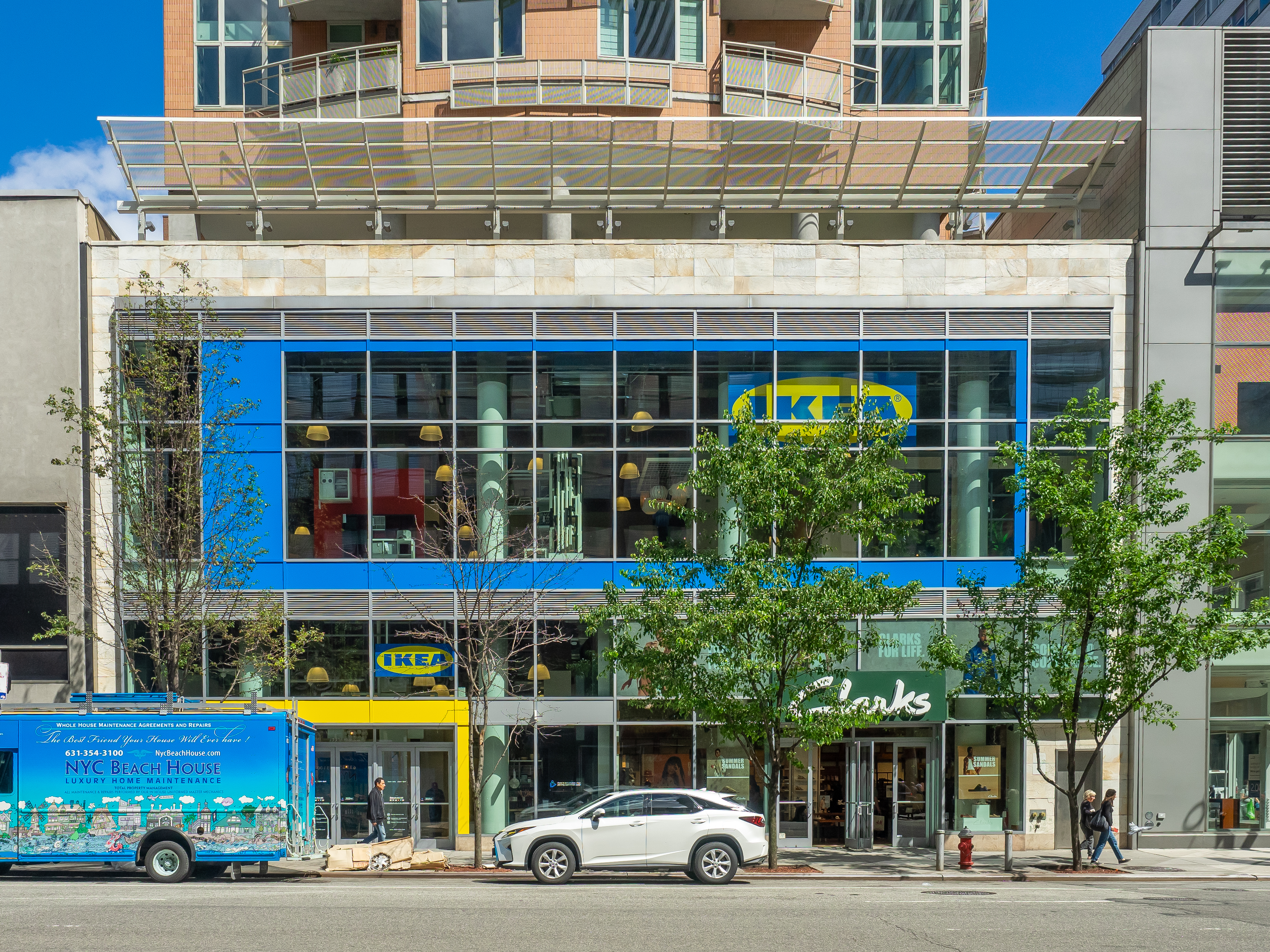 Upper East Side, NYC